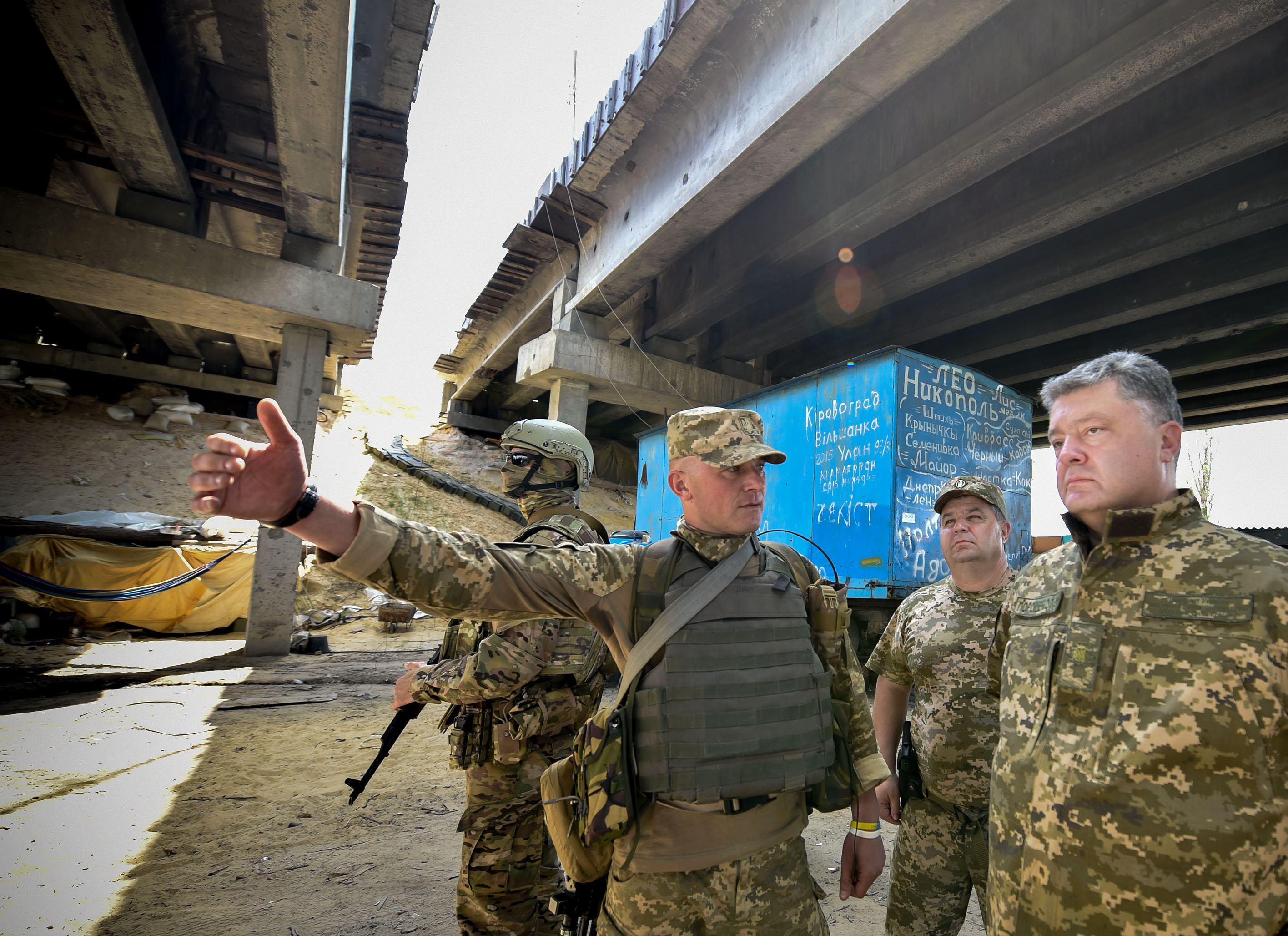 Президент проінспектував опорні пунтки на передовій у Донецькій області.